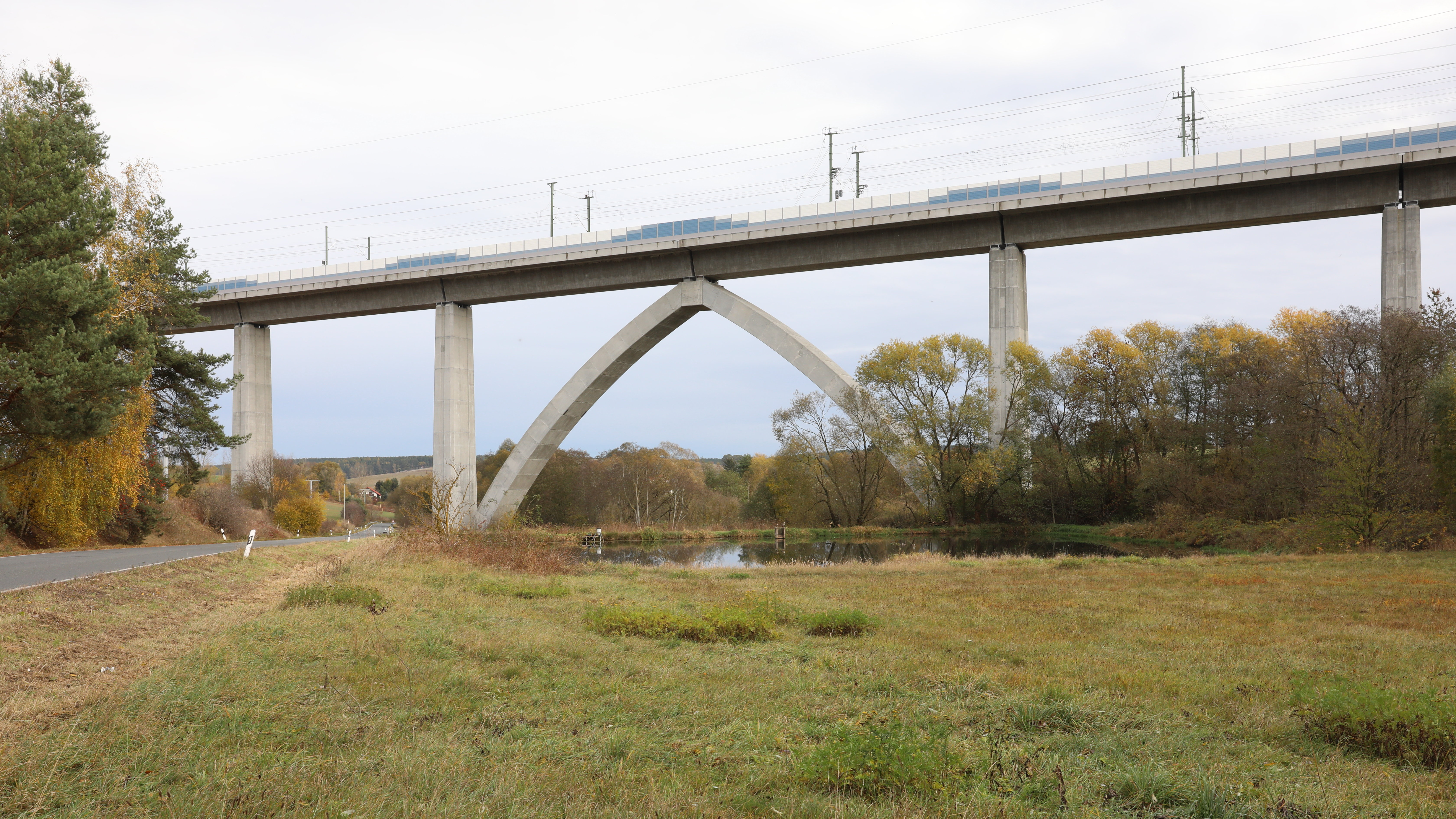 Wümbachtalbrücke